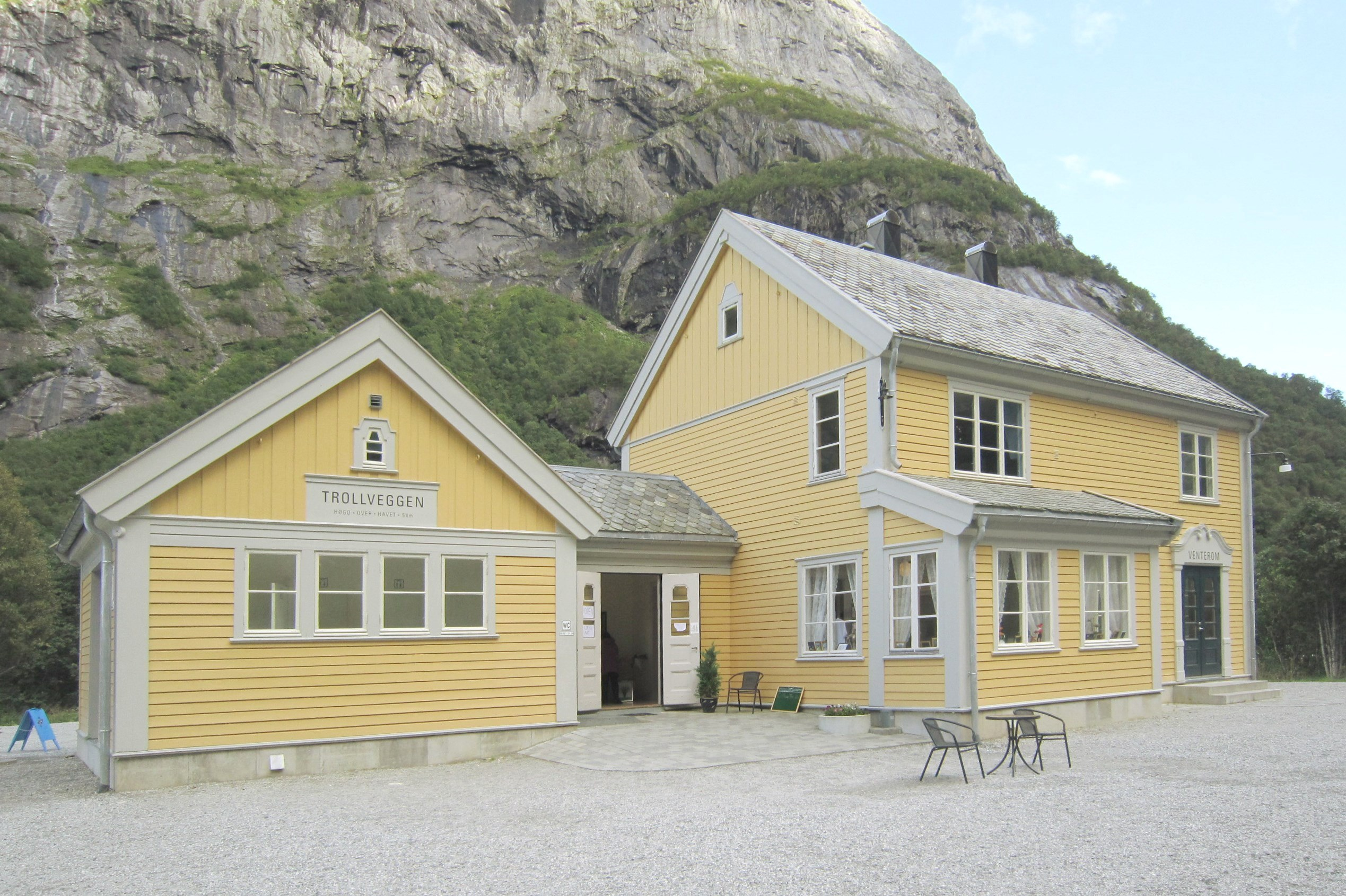 Trollveggen "stasjon", med bygninger flyttet fra Romsdalshorn stoppested, ved Raumabanen